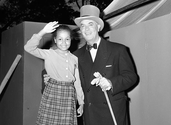 Parkteater i Vasaparken. Karl Gerhard spelar ""Jag och lilla Frida"" med sin adoptivdotter Fatima, med anledning av Stockholms 700-års jubileum